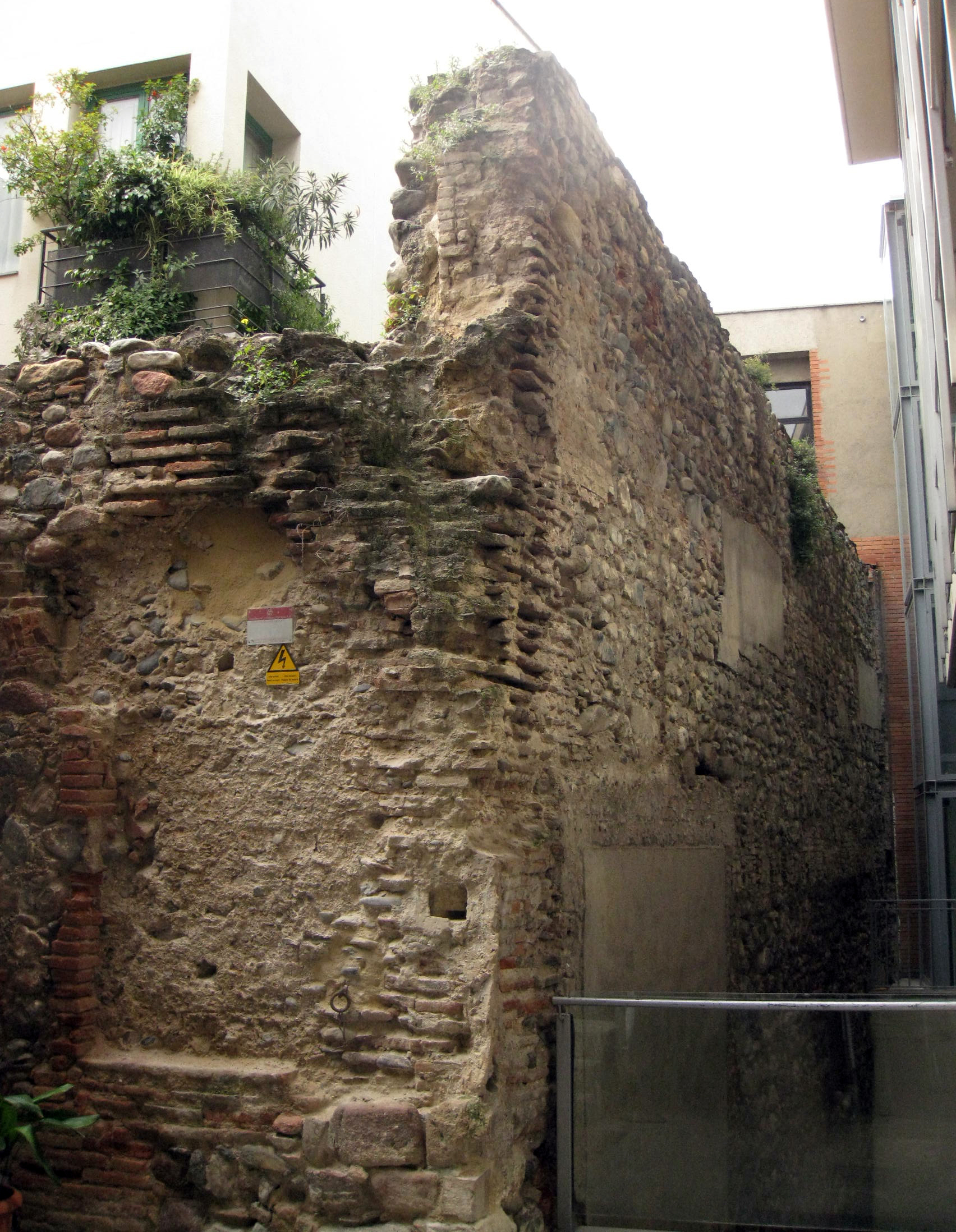 Restes del recinte emmurallat (Granollers)